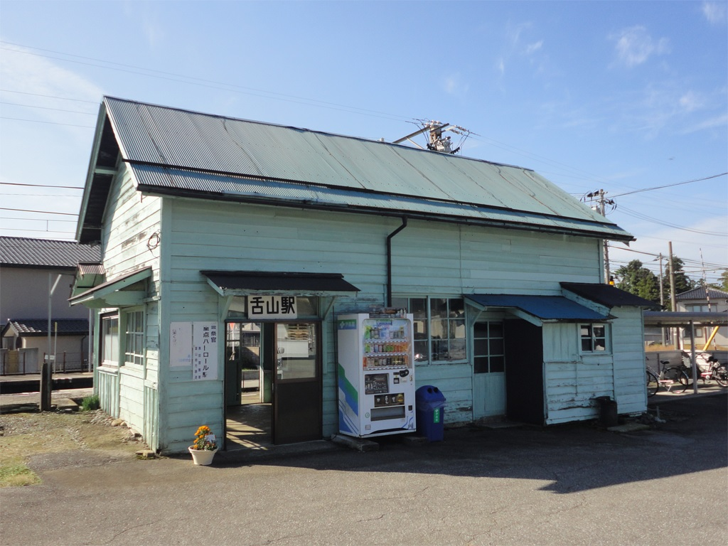 富山地方鉄道本線 舌山駅 駅舎